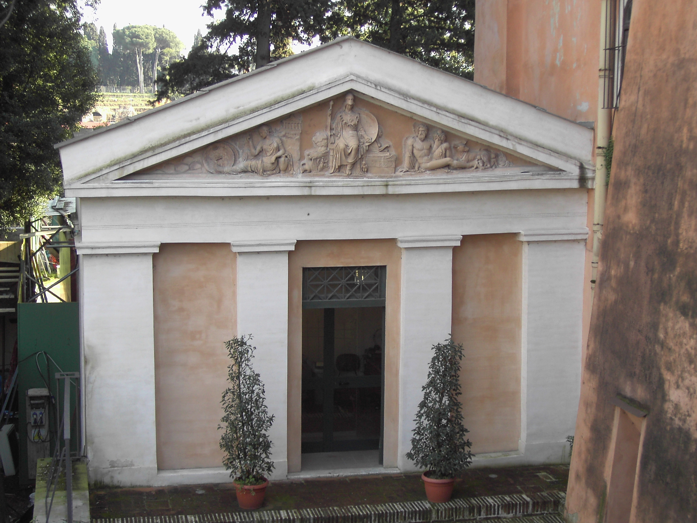 Roma, via del Tempio di Giove al Campidoglio, Casa Tarpea (1835), sede della biblioteca di quello che era ancora "Istituto di corrispondenza archeologica", poi Istituto Archeologico Germanico.